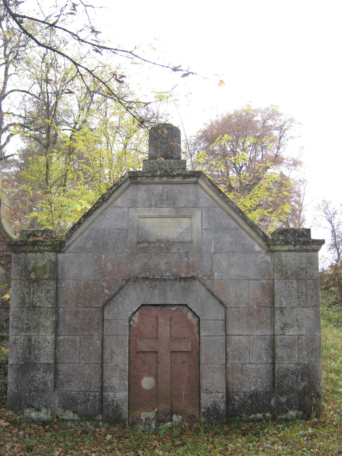 Гробниця. Цвинтар Федір. Бучач, осінь 2013